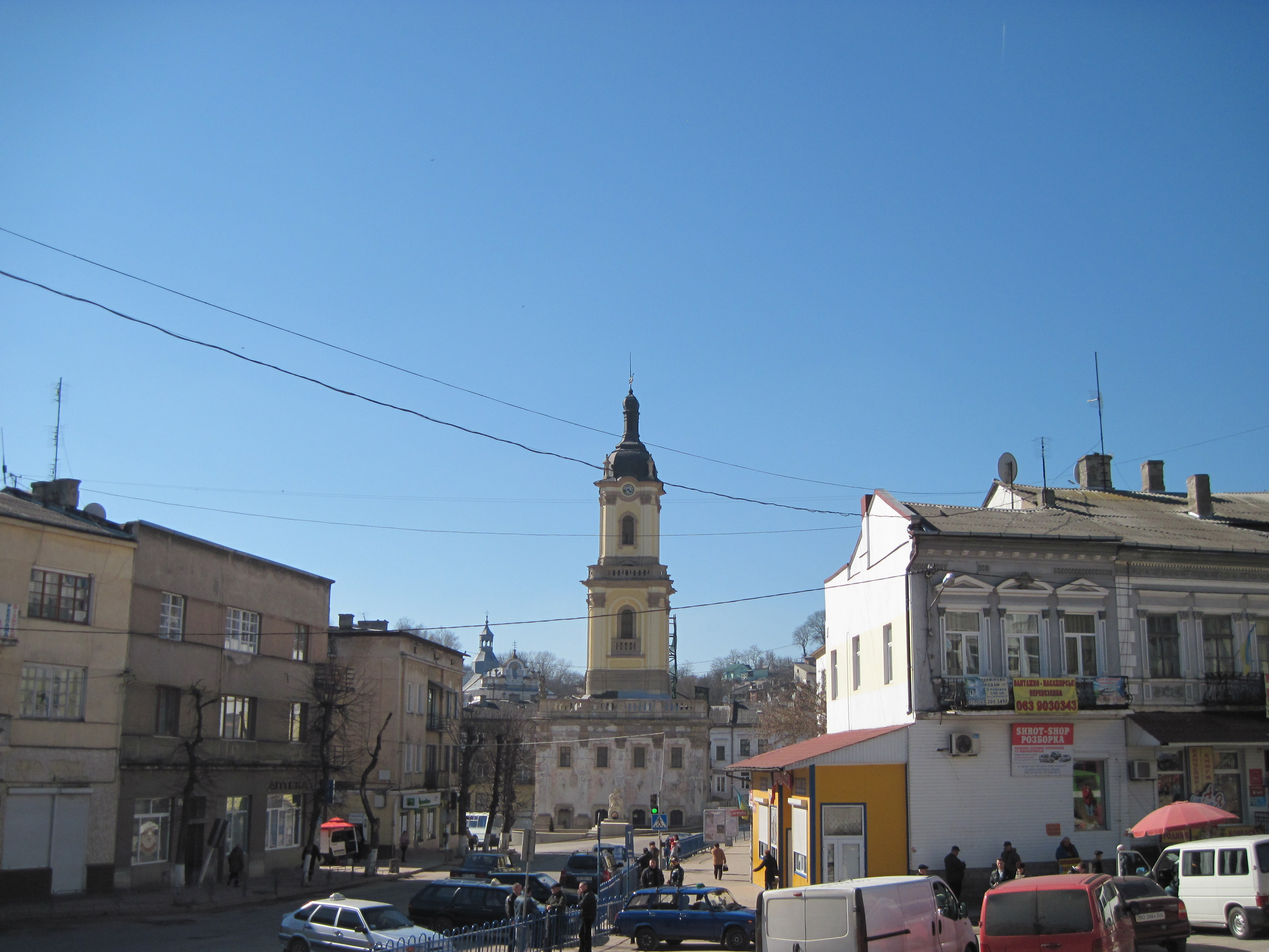 Вигляд на Майдан Волі з площі Ринок, 2015